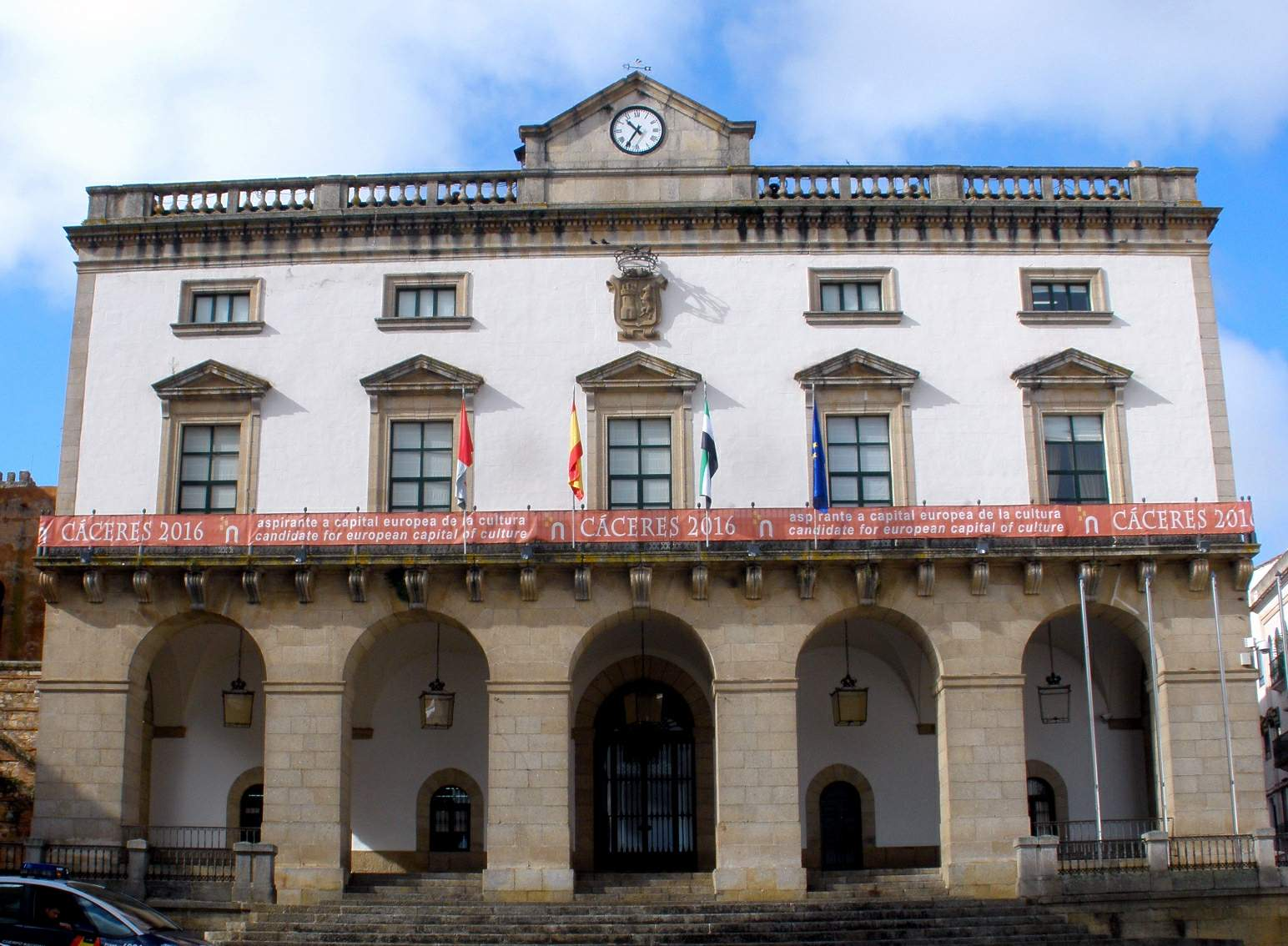 Caceres - Ayuntamiento